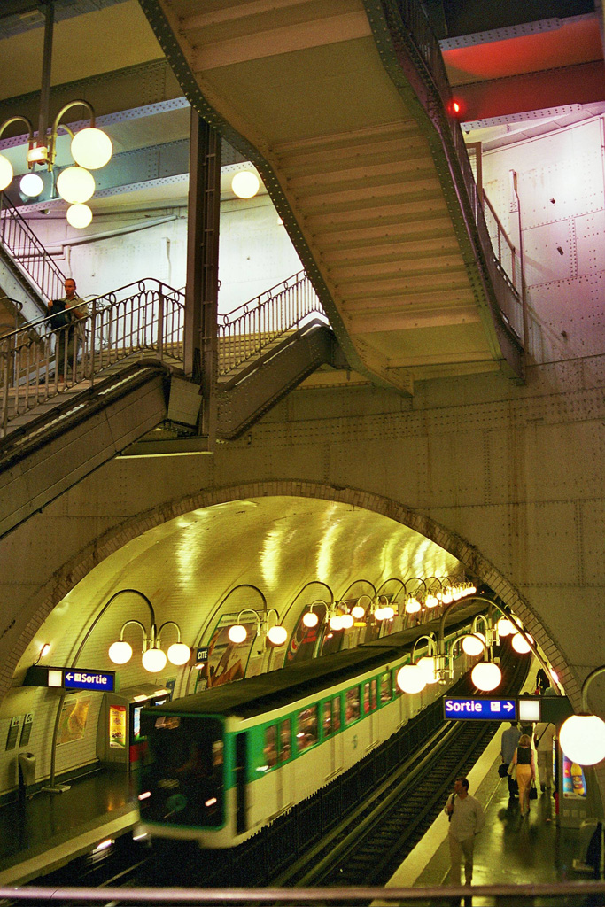 Paris, Metro Station - Linie 4, Cité